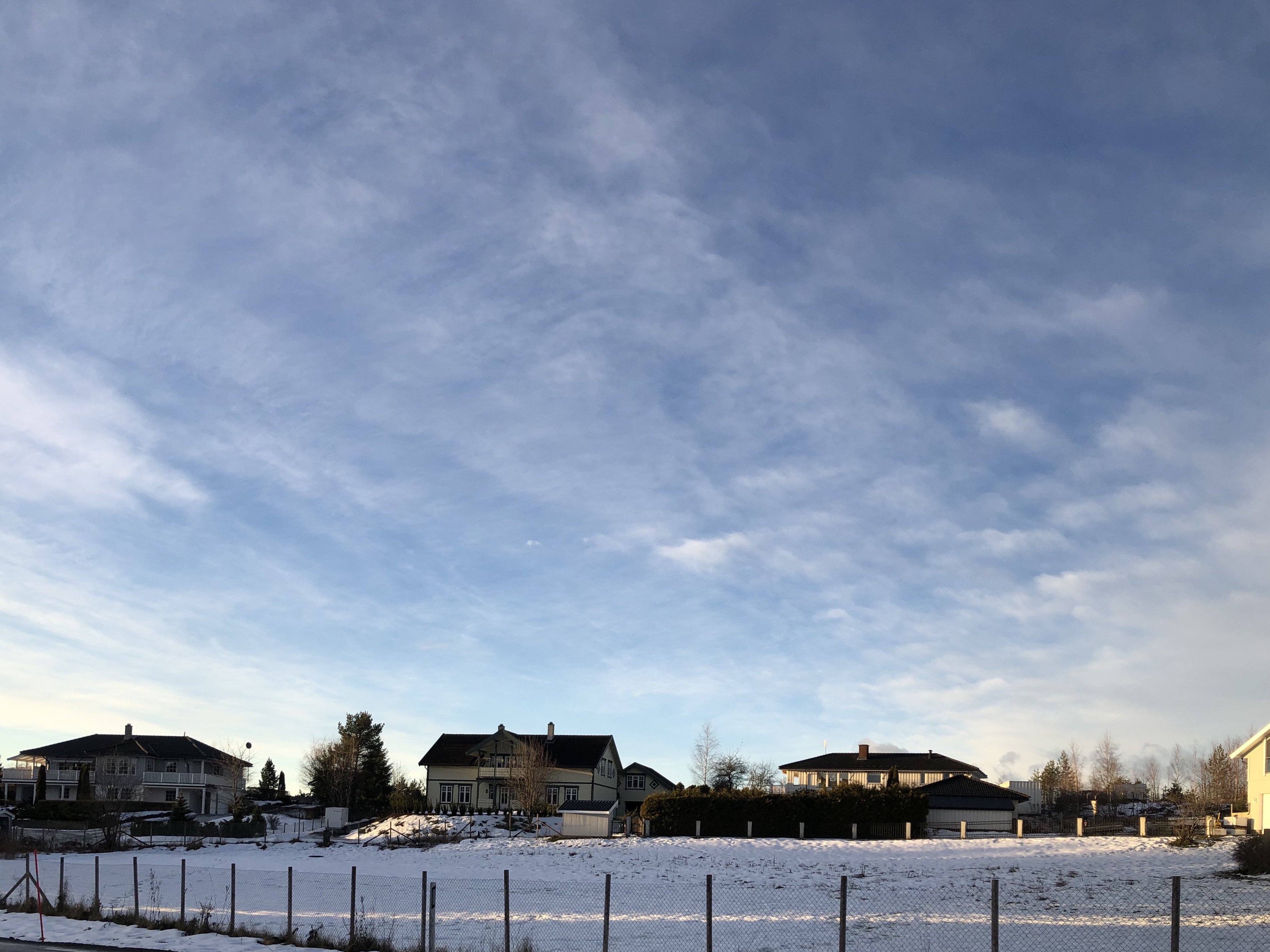 Ådalsveien 38, 40, 42, Børdalen, Hønefoss